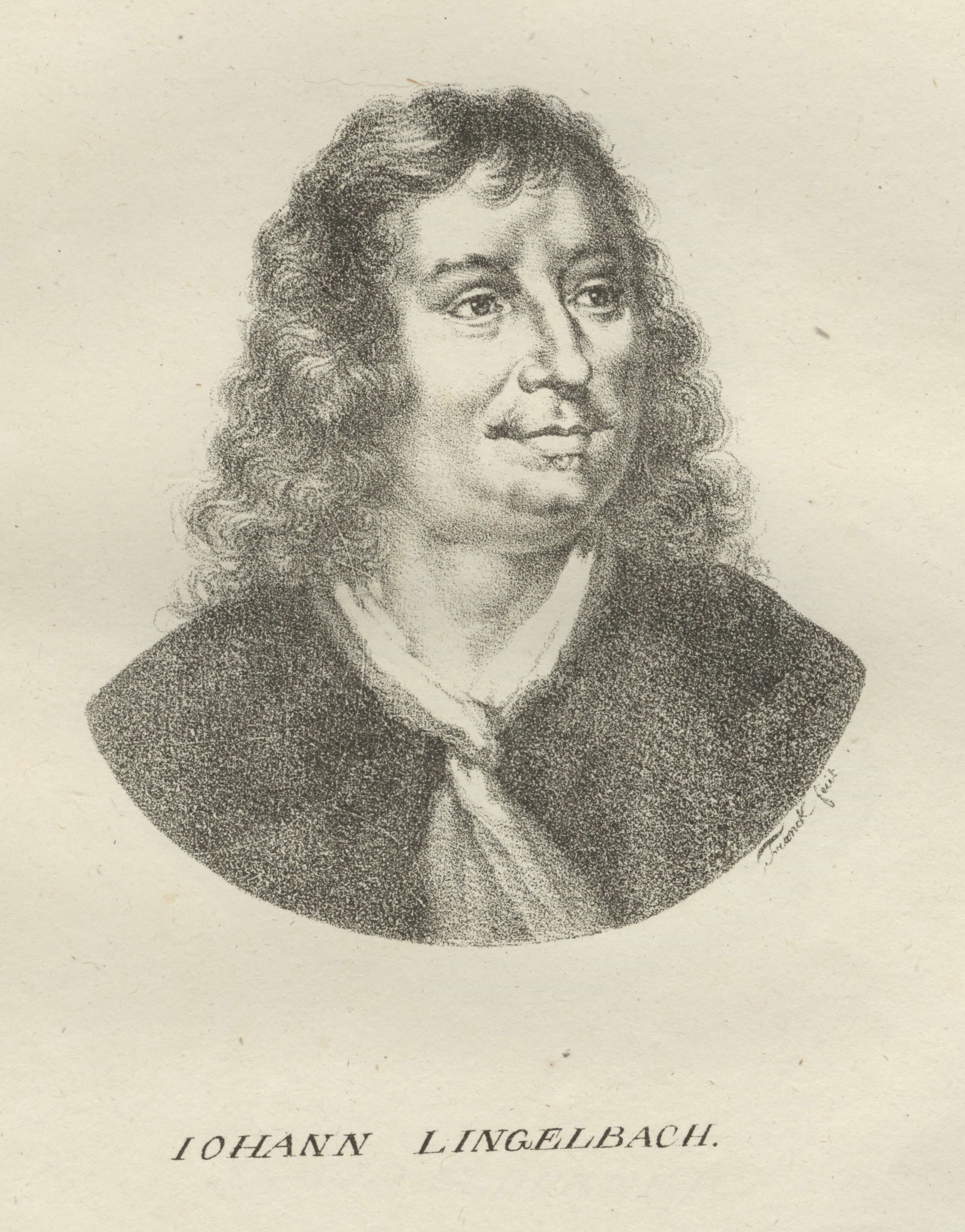 Porträt von Johannes Lingelbach